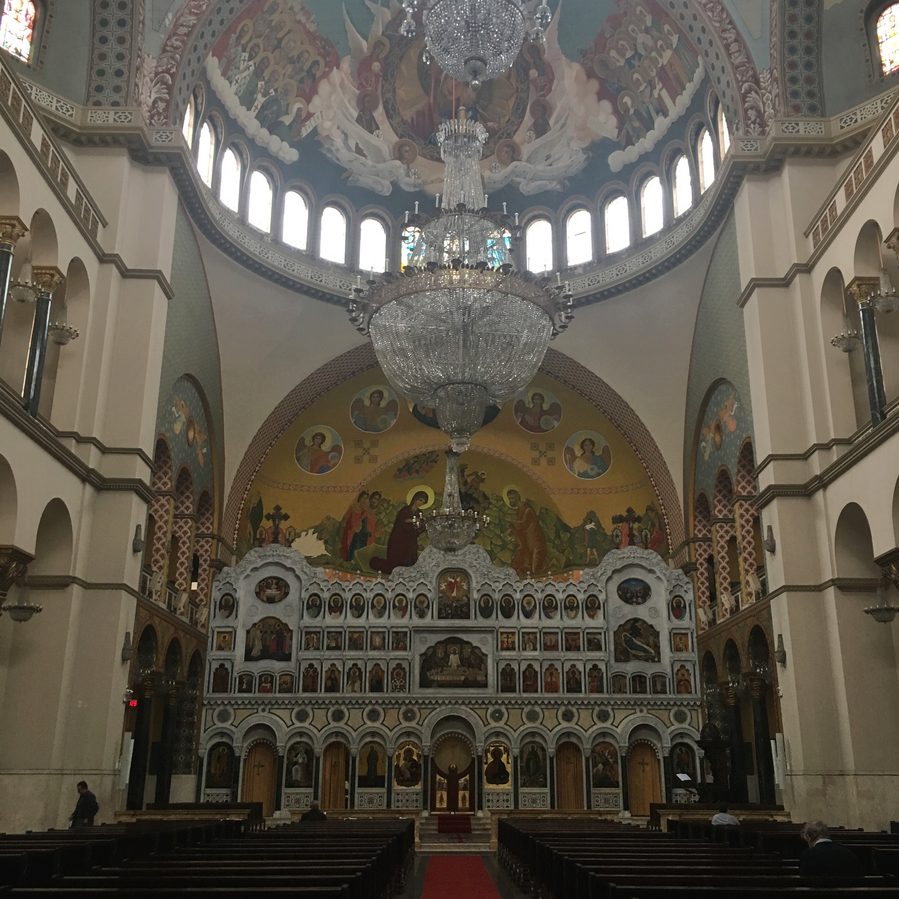 Vista de frente da nave da catedral.